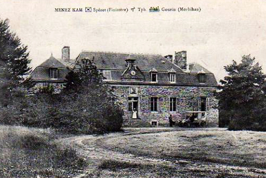 Le château ou manoir breton MENEZ KAMM, entre Spézet (Finistère) et Gourin (Morbihan), isolé sur une crête des montagnes Noires. Bâtie par le peintre Henry Moulton, qui place ses armes sur le fronton, cette résidence de chasse appartient ensuite à la comtesse Vefa de Méhérenc de Saint-Pierre (1872-1967), grande voyageuse, écrivain et militante bretonne. Dans les années 1970, cette demeure abrite un centre culturel breton renommé.